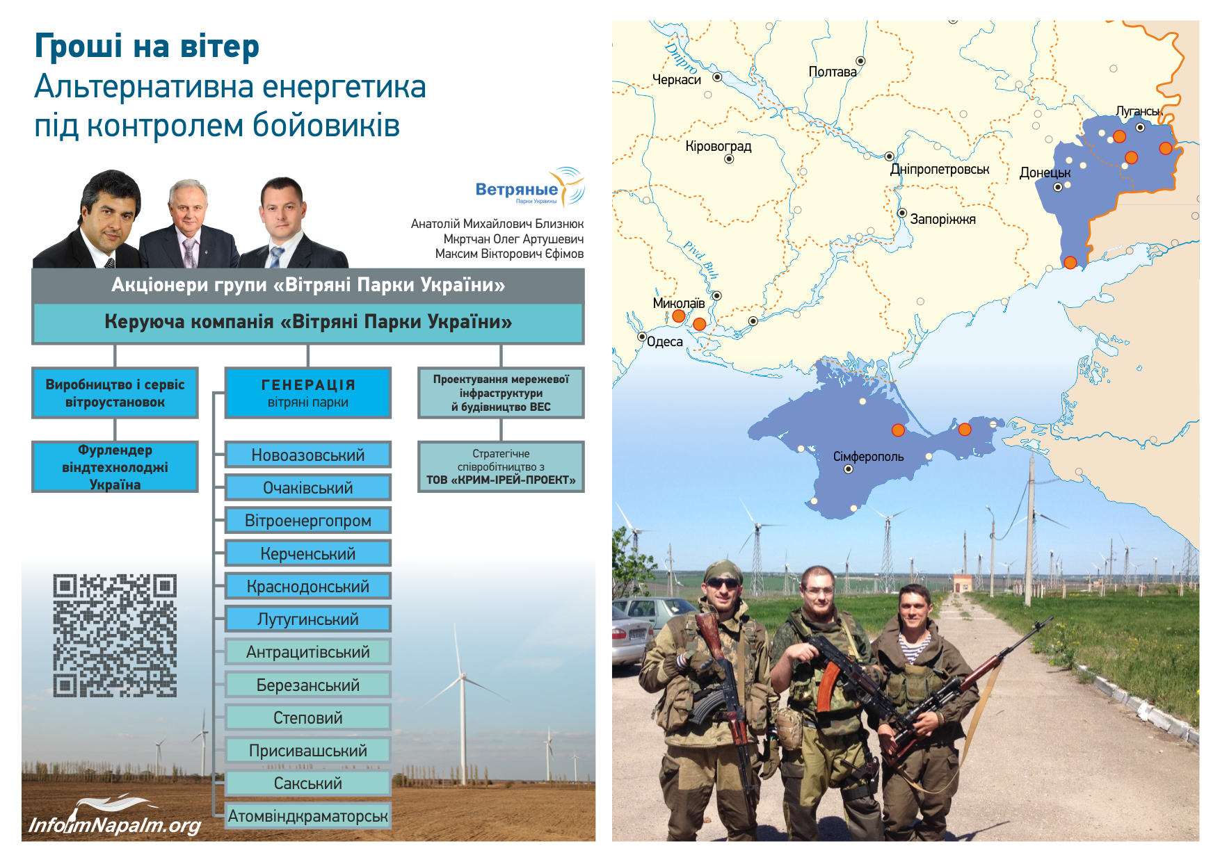 Інфографіка від Inform Napalm. Гроші на вітер. Альтернативна енергетика під контролем бойовиків.